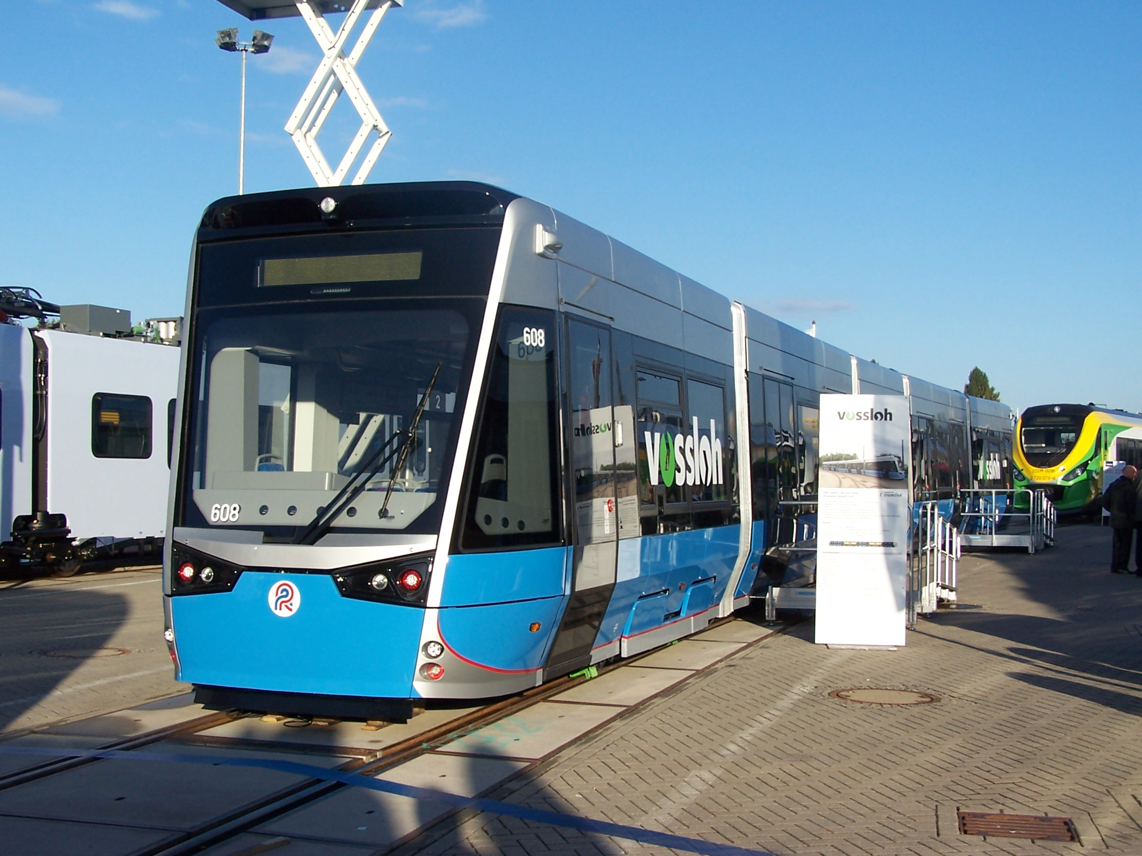 Vossloh Tramlink 6N2 608 der Straßenbahn Rostock auf der InnoTrans 2014.